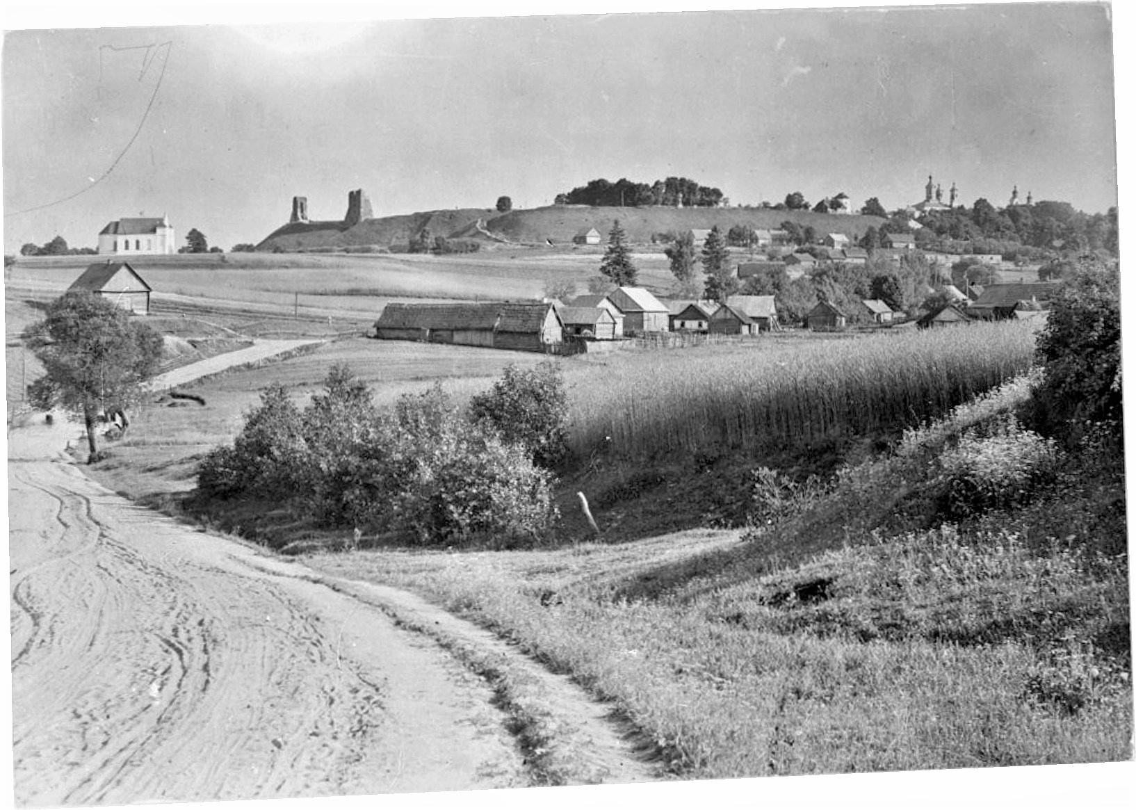 Беларуская (тарашкевіца): Наваградак (Navahradak), вуліца Віленская (vulica Vilenskaja)